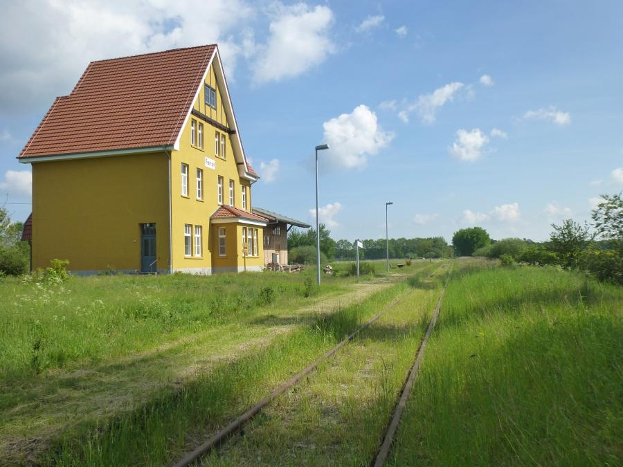 Bahnhof Harpe (Altmark)